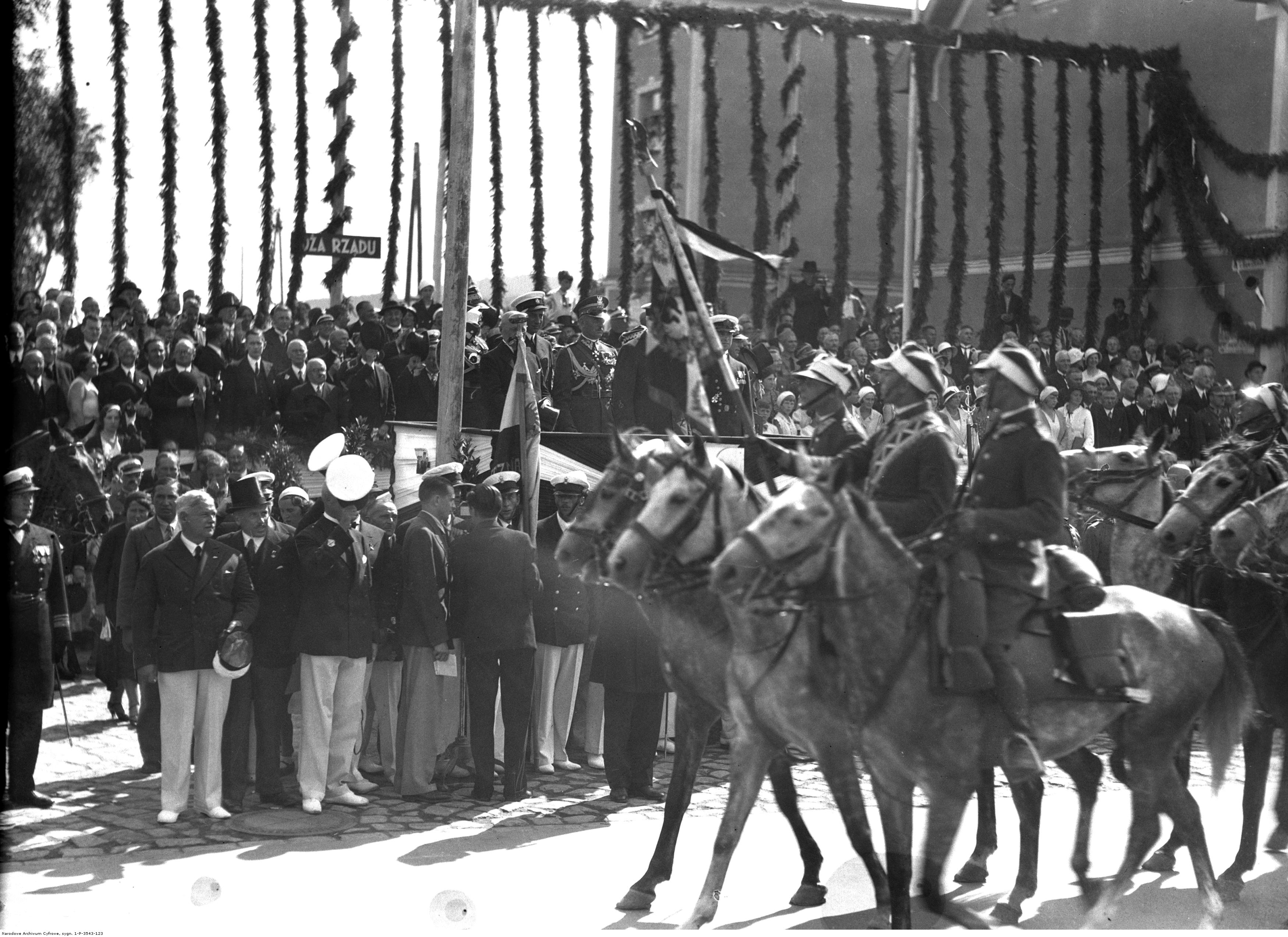 Obchody Święta Morza w Gdyni 31 lipca 1932. Kawalerzyści z 18 Pułku Ułanów Pomorskich podczas defilady. Na trybunie widoczni m.in.: wiceminister spraw zagranicznych Józef Beck (2. z lewej), szef Gabinetu Wojskowego Prezydenta RP pułkownik Jan Głogowski (3. z lewej), szef Kierownictwa Marynarki Wojennej kontradmirał Jerzy Świrski (1. z prawej). Koncern Ilustrowany Kurier Codzienny - Archiwum Ilustracji. Sygnatura: 1-P-3543-123